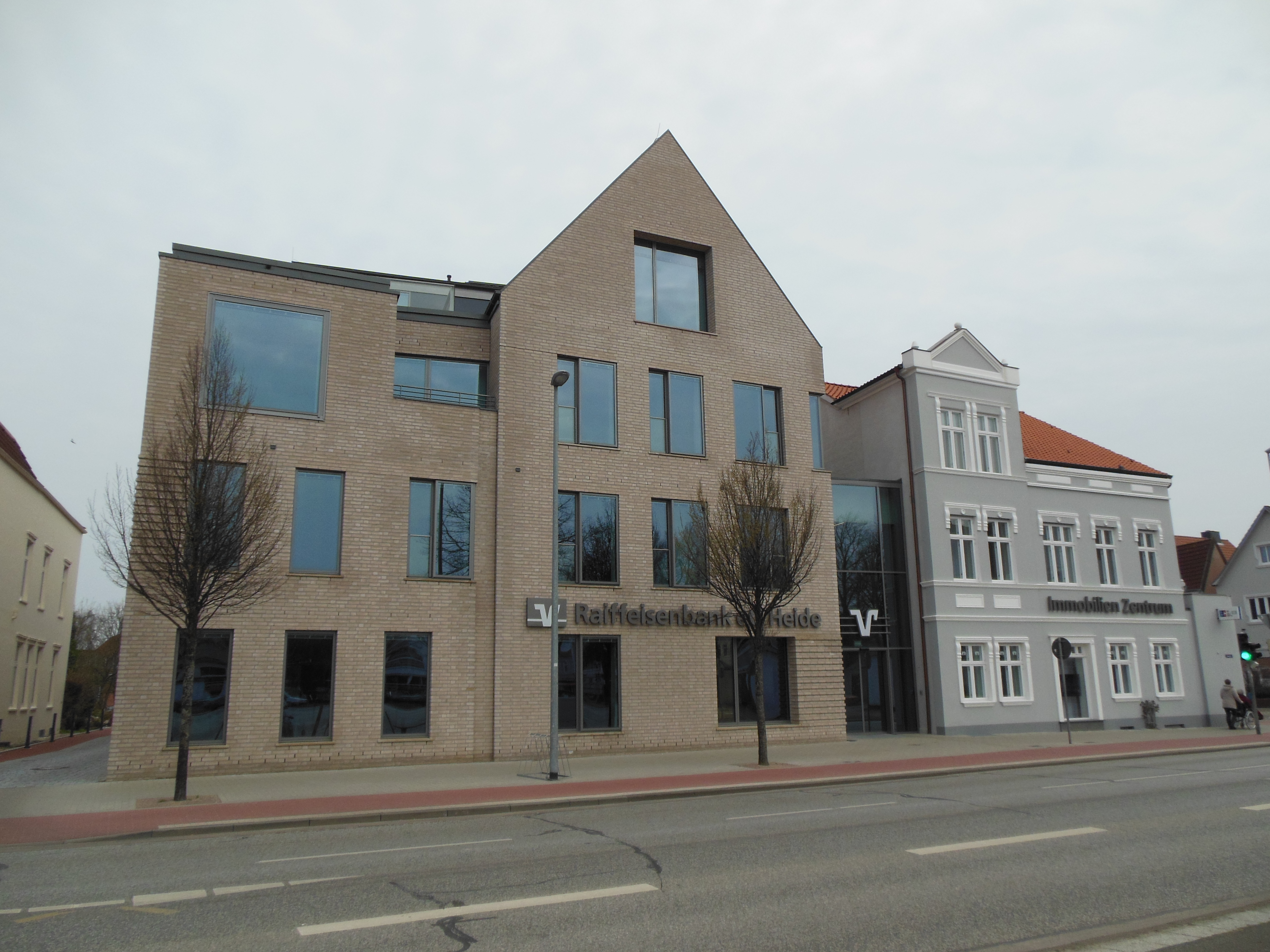 Neubau der Raiffeisenbank eG Heide, 25746 Heide, Deutschland, Markt 73-75